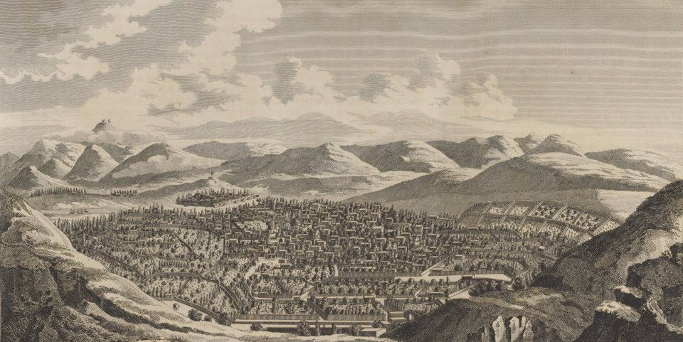 Երևանը 17-րդ դարավերջին, ըստ Ժան Շարդենի ուղեկից նկարիչ Ժոզեֆ Գրելոյի